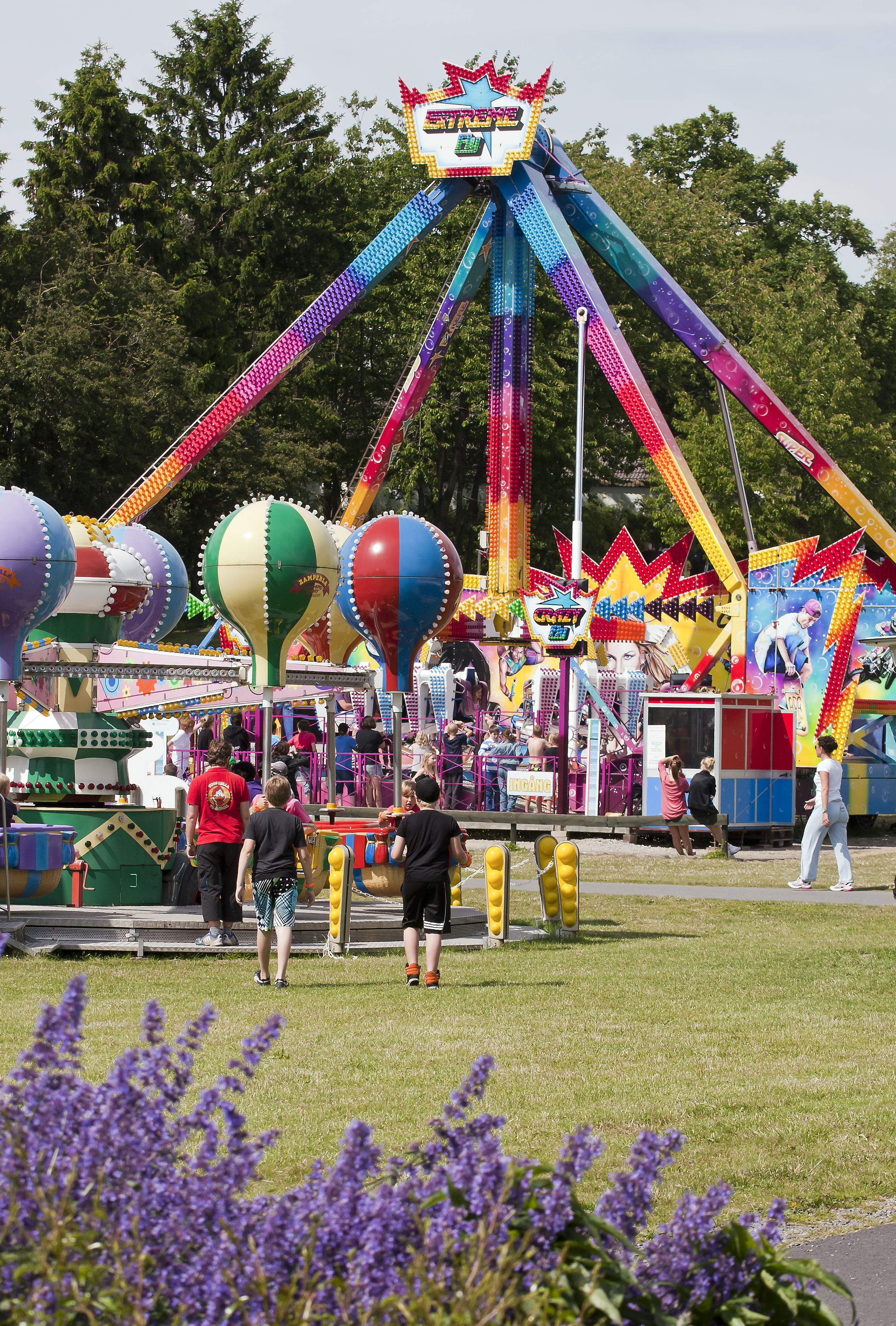 Attraktioner på Tosselilla sommarland.